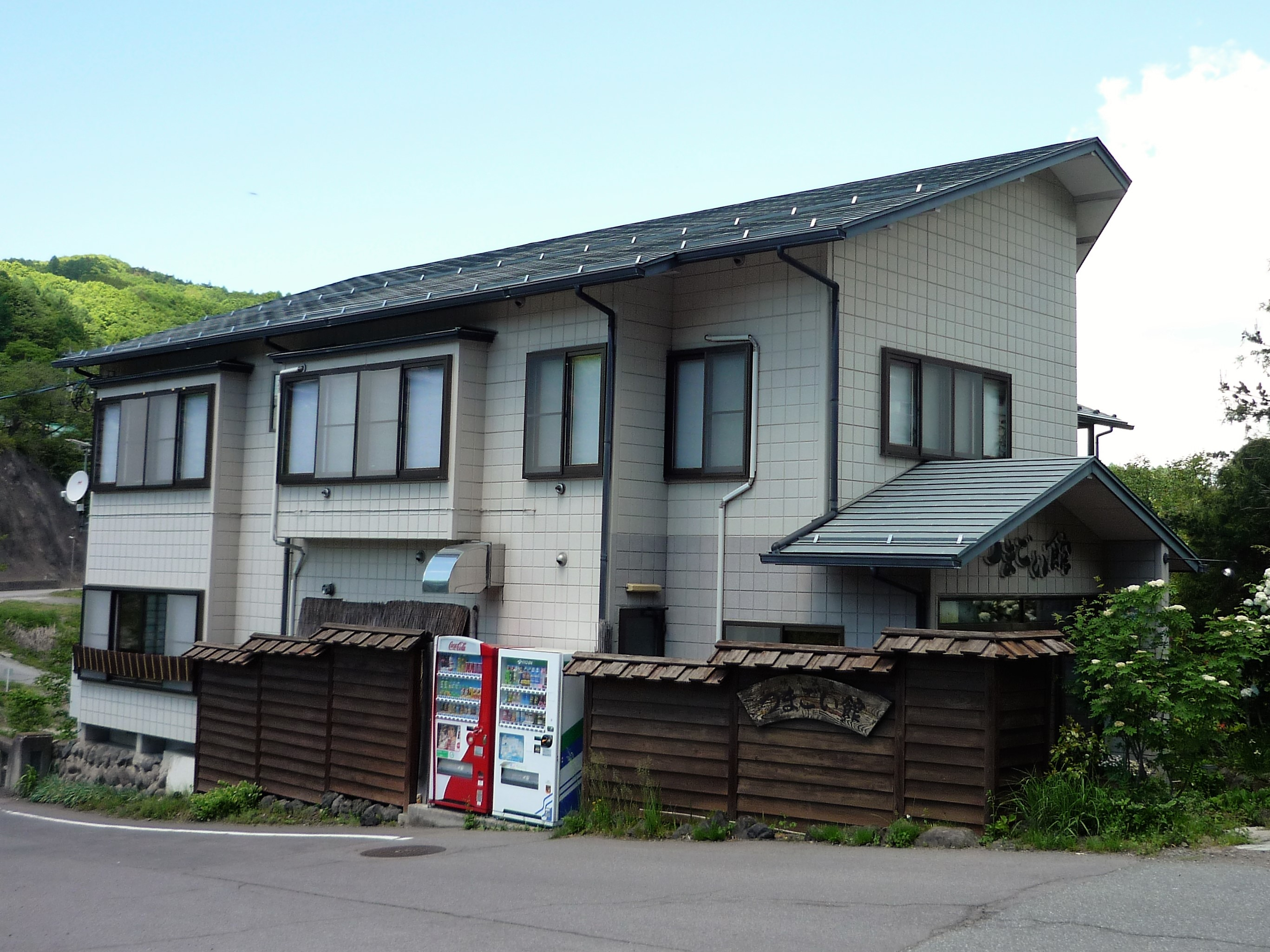 嬬恋温泉・つまごい館（大前駅前）